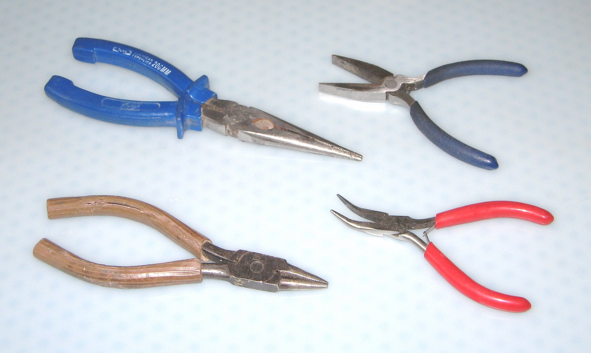 Juego de alicates de electricistas Pincxiloj La foto estis farita de mi mem.